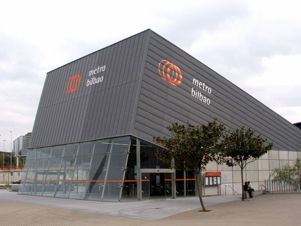 Estacion de Metro de Ansio (Barakaldo)